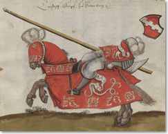 Graf Christoph von Ortenburg († 1551) im Turniergewand aus dem Turnierbuch Herzog Wilhelms IV. von Bayern († 1550); Count Christoph of Ortenburg († 1551) in the tournament book of duke William IV. of Bavaria († 1550).